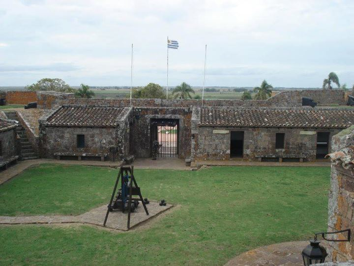 Forte São Miguel localizado a cerca de 6 quilômetros a sul da Lagoa Mirim, próxima ao Chuy, no Departamento de Rocha, no Uruguai.